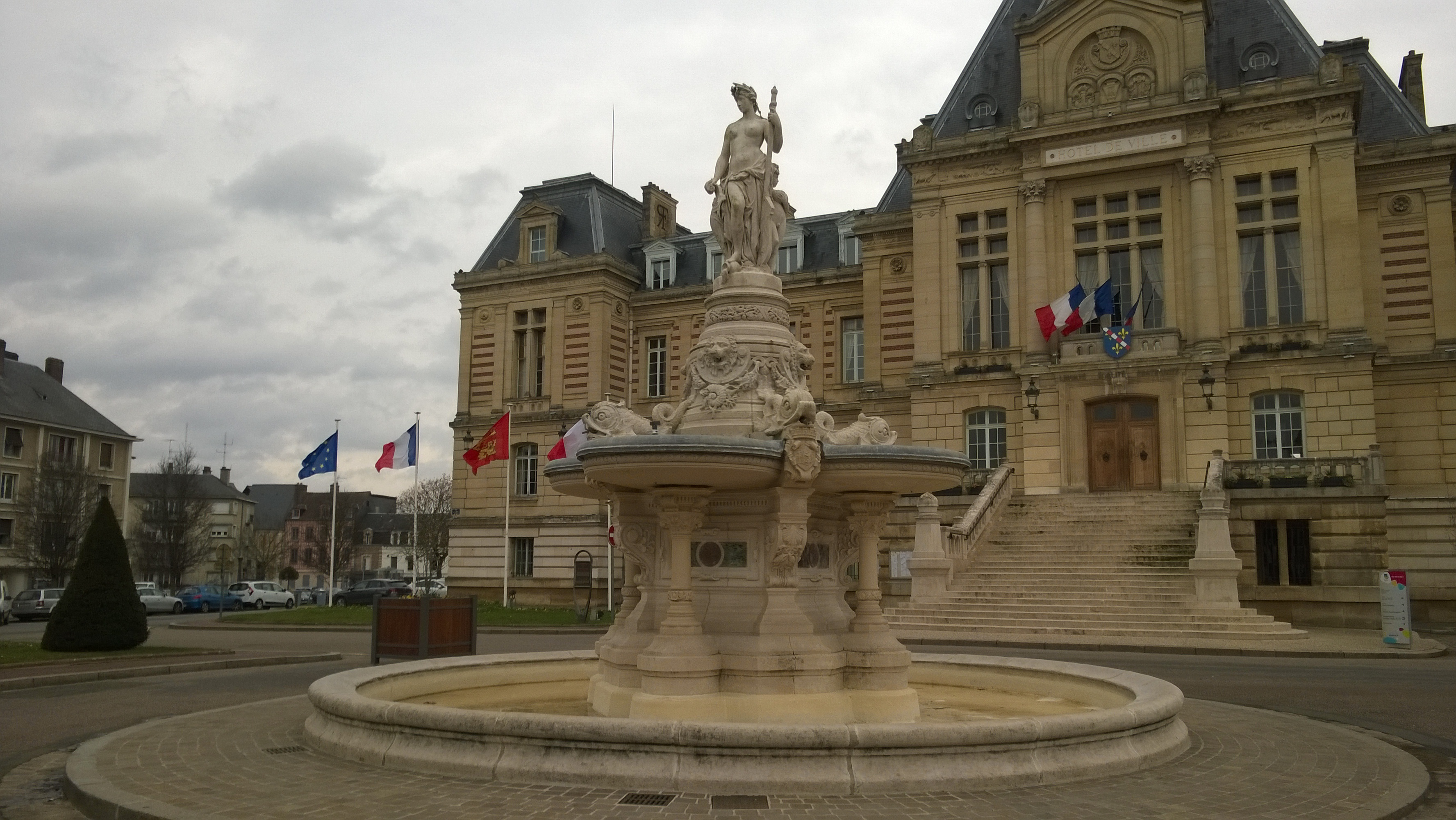 La Fontaine monumentale avec en arrière plan l'hôtel-de-ville d'Évreux.